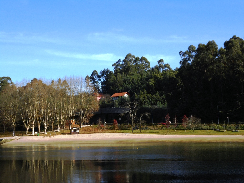 Playa del Lérez Pontevedra capital